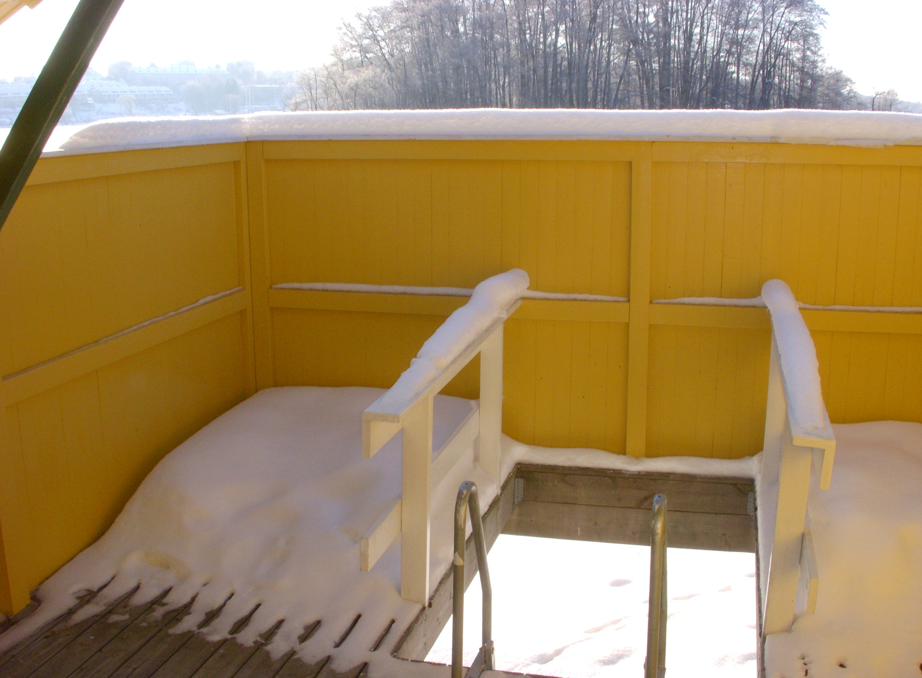 En så kallad "badsump" på Lindholmen